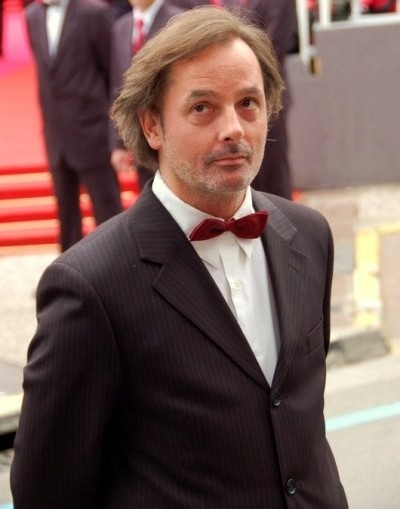 Christophe Alévêque au festival de Cannes